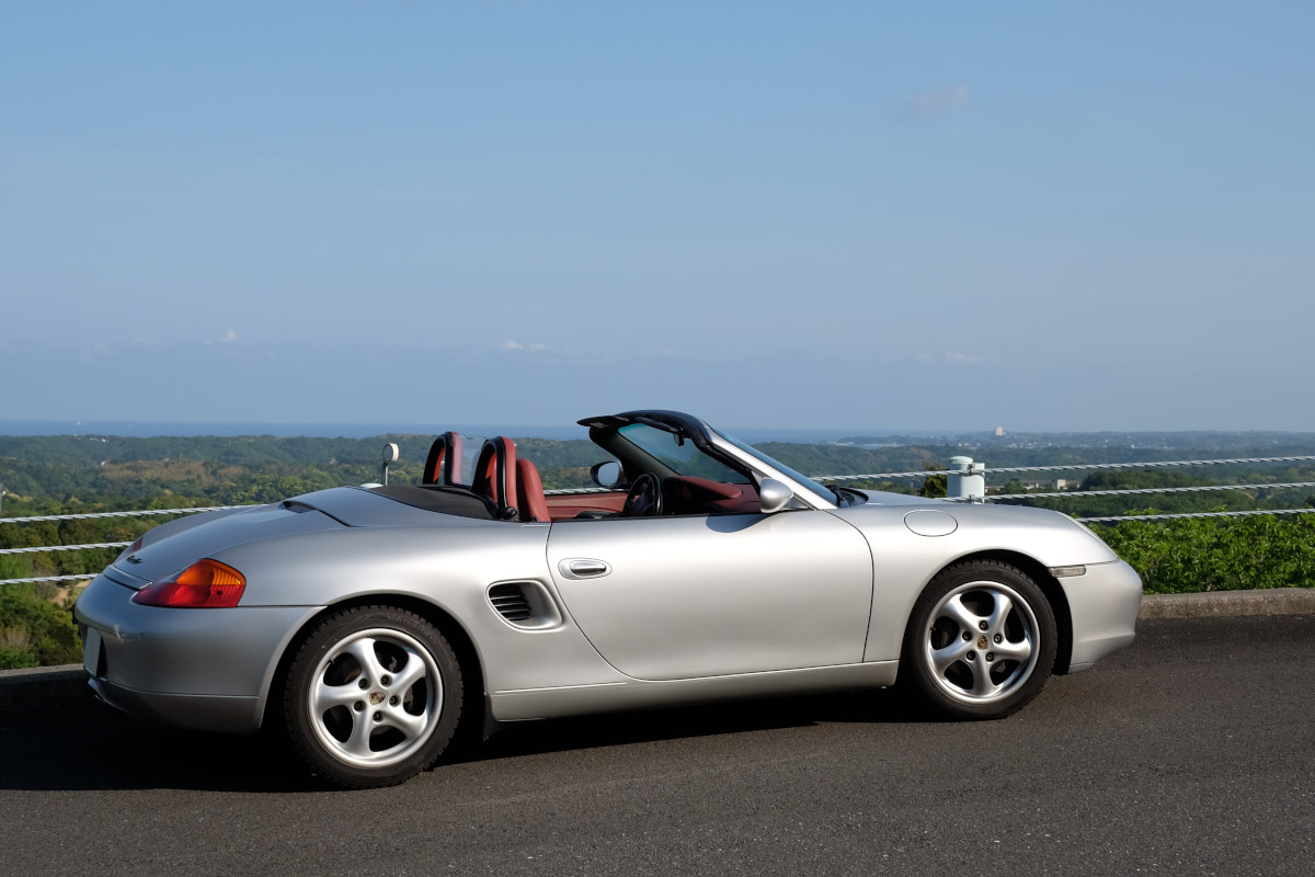 986型 Boxtser 2.5